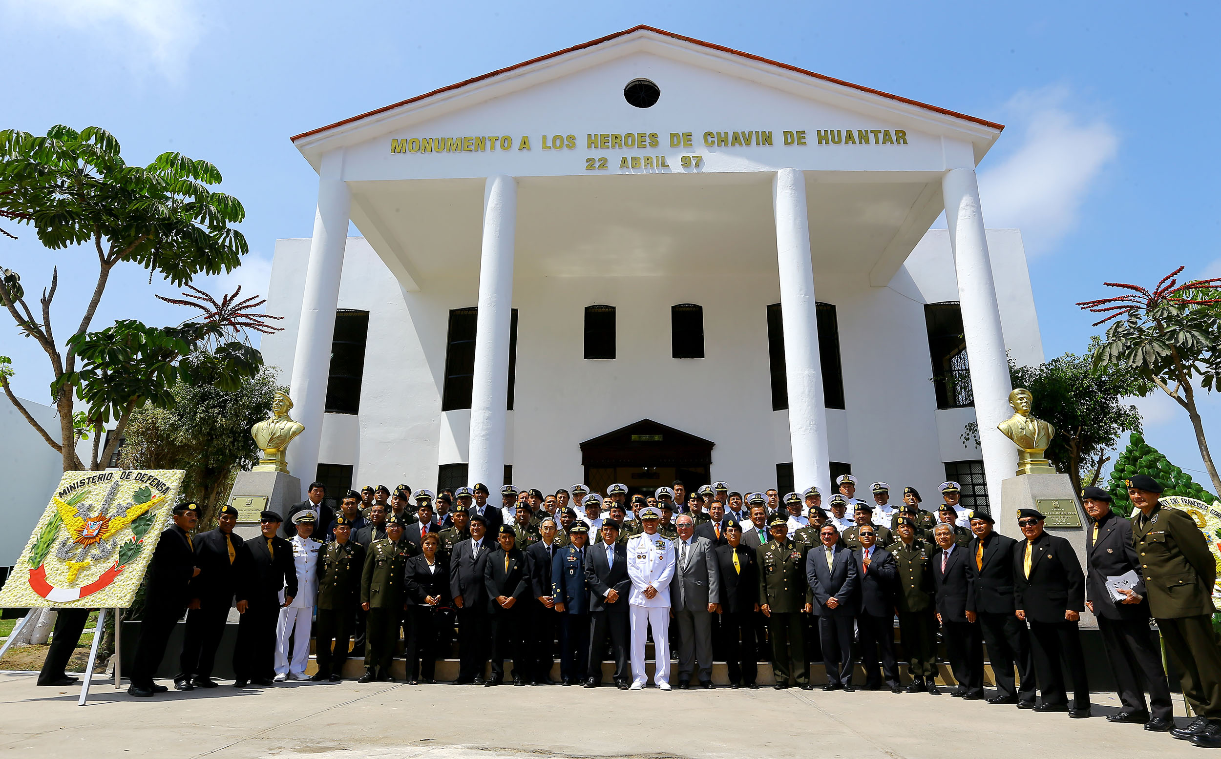 Aniversario por los 16 años de la operación Chavin de Huantar.